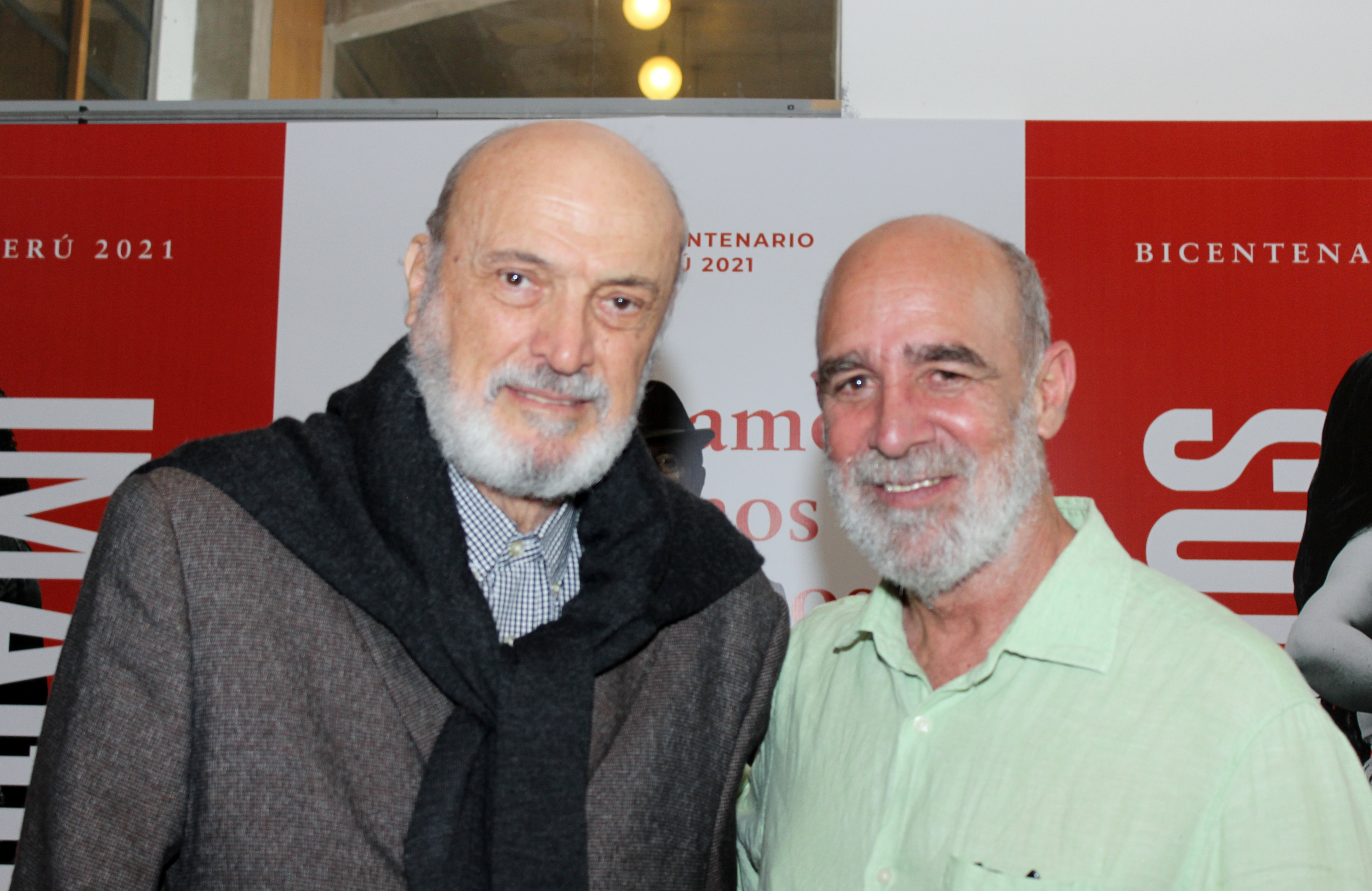 El escritor peruano Fernando Ampuero y el artista plástico Ricardo Wiesse en la Feria Internacional del Libro de Santiago 2018.